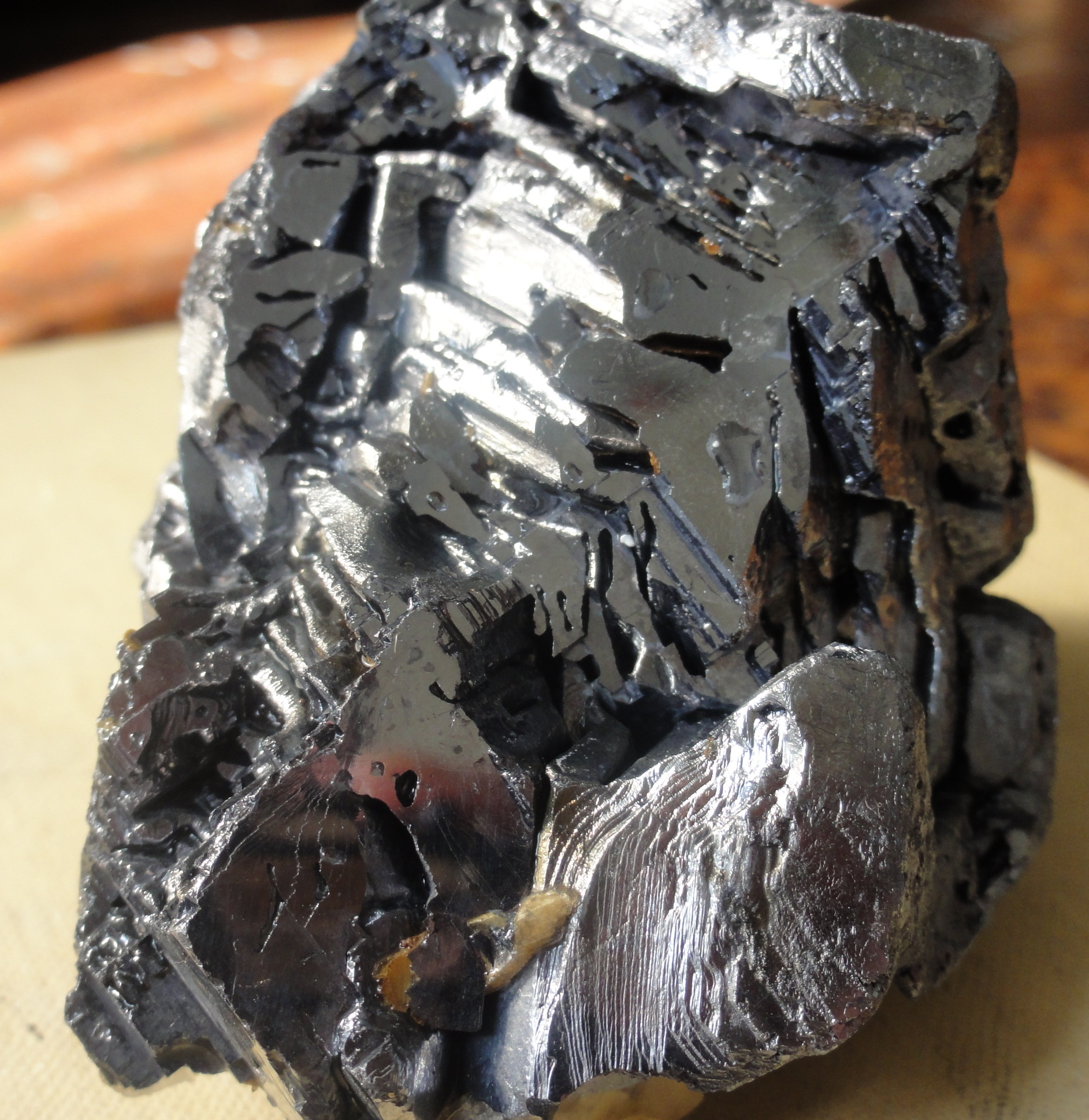 Галенит. Рудник "Верхний", Дальнегорск